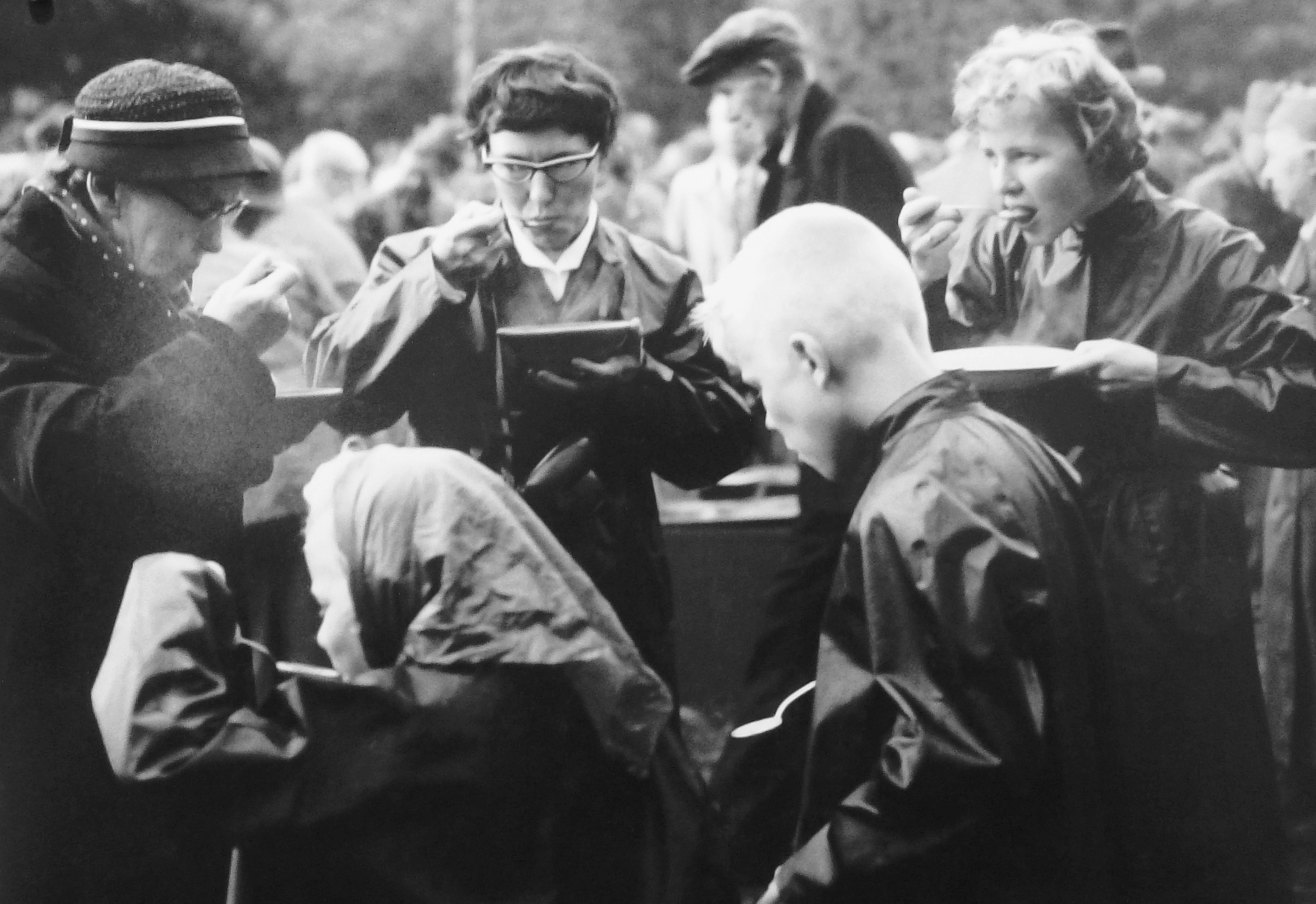 Stockholms läns museets utställning: Atombomb över Stockholm / Operation Stockholm (soppkök på mottagningsplatsen)